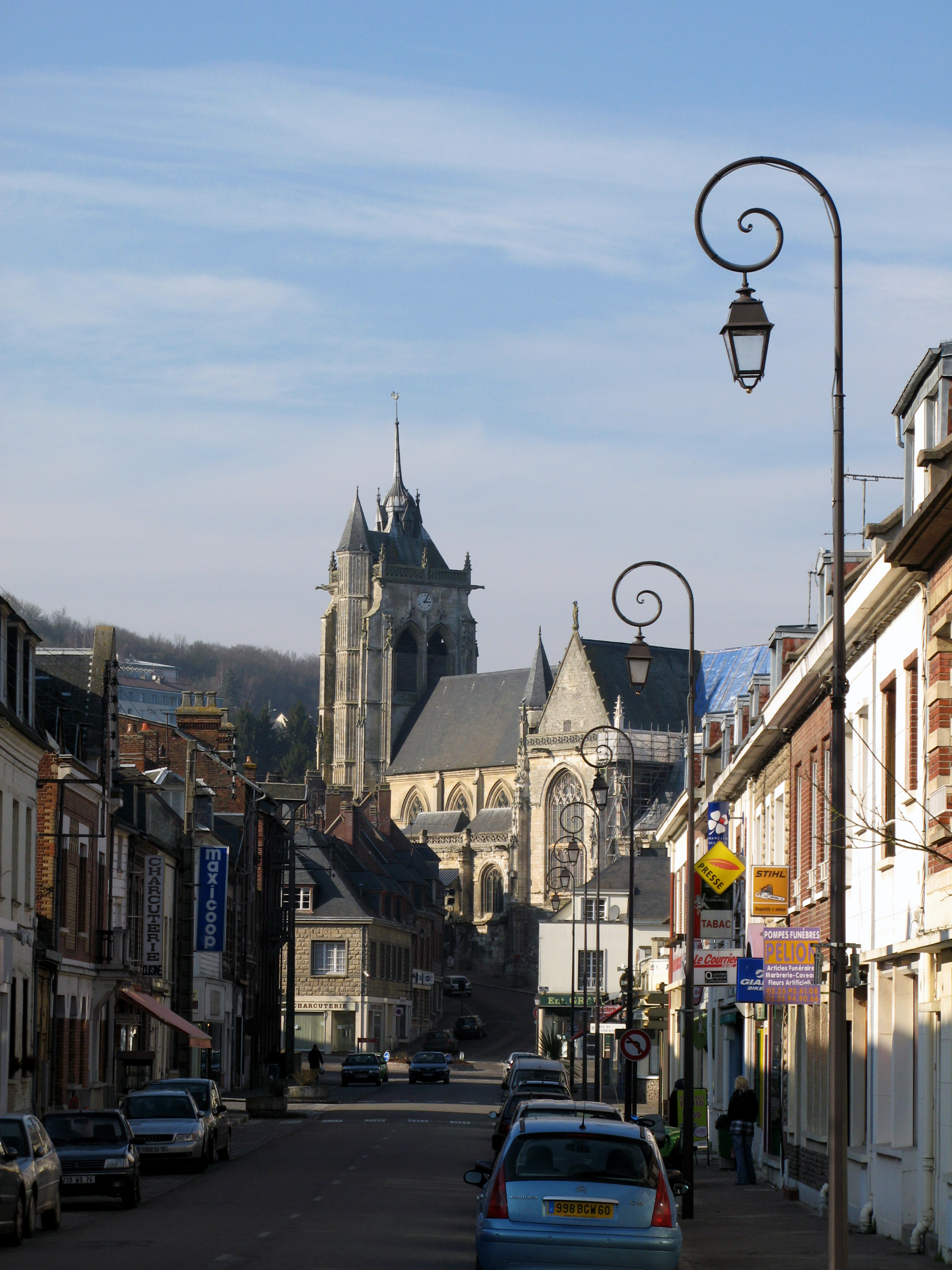 Aumale (Seine-Maritime, France) - Accès vers le centre-ville, en arrivant de Poix-de-Picardie, avec vue sur l'église Saint-Pierre et Saint-Paul. . .